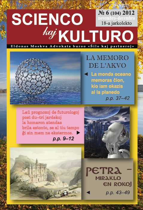 titolpaĝo de la revuo